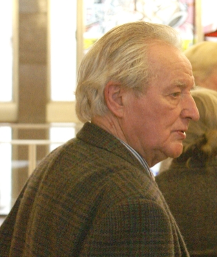 Der Maler Günther Brendel während einer Veranstaltung in Berlin-Mitte, Februar 2008